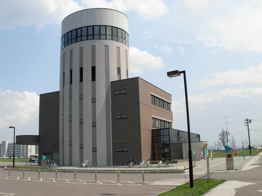 Nanporo Bureau 南幌ビューロー 左下に写っているバスは夕張鉄道（夕鉄バス）の車両